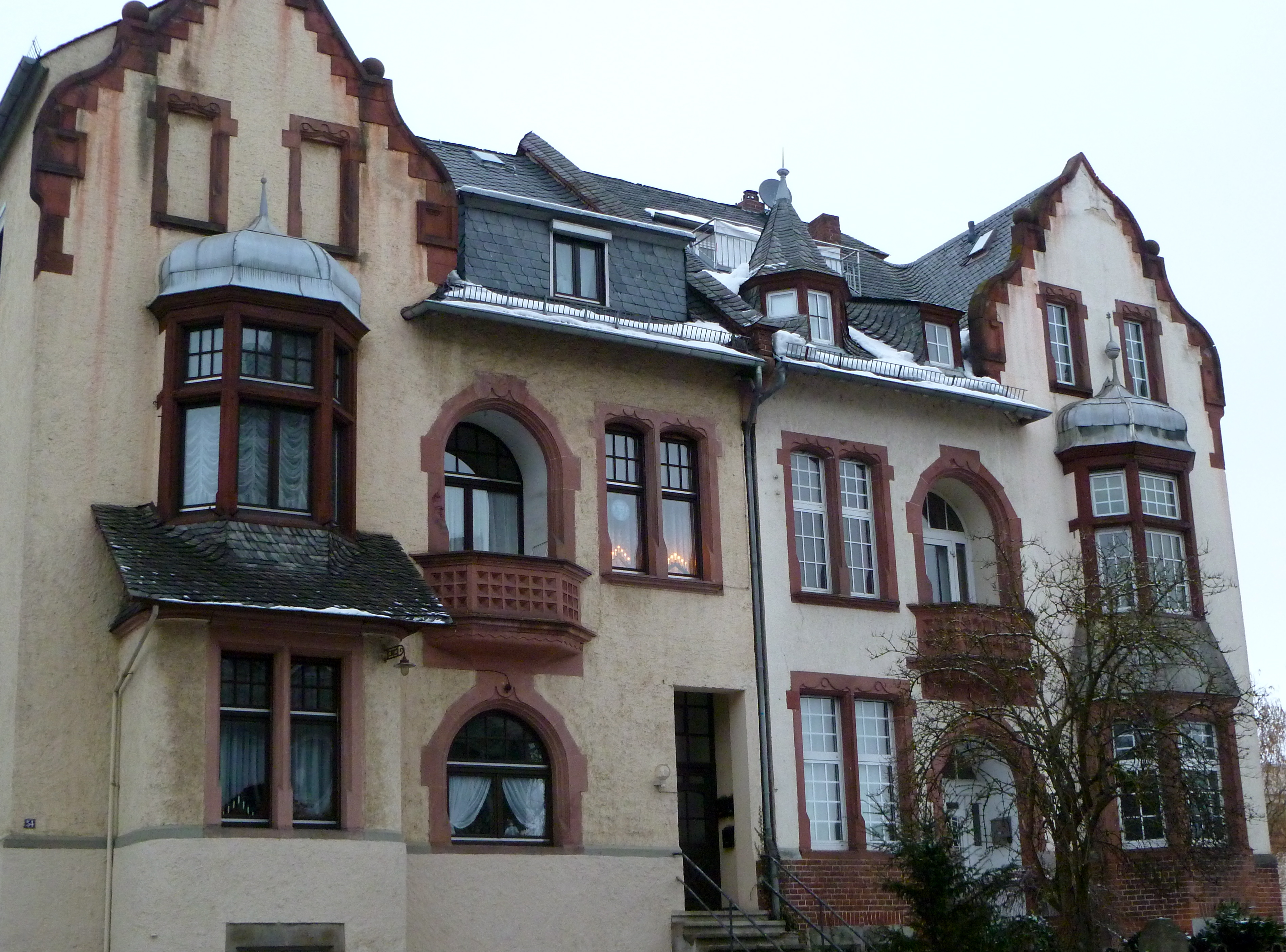 Fenstersanierungen verschiedener Art im Altbau.